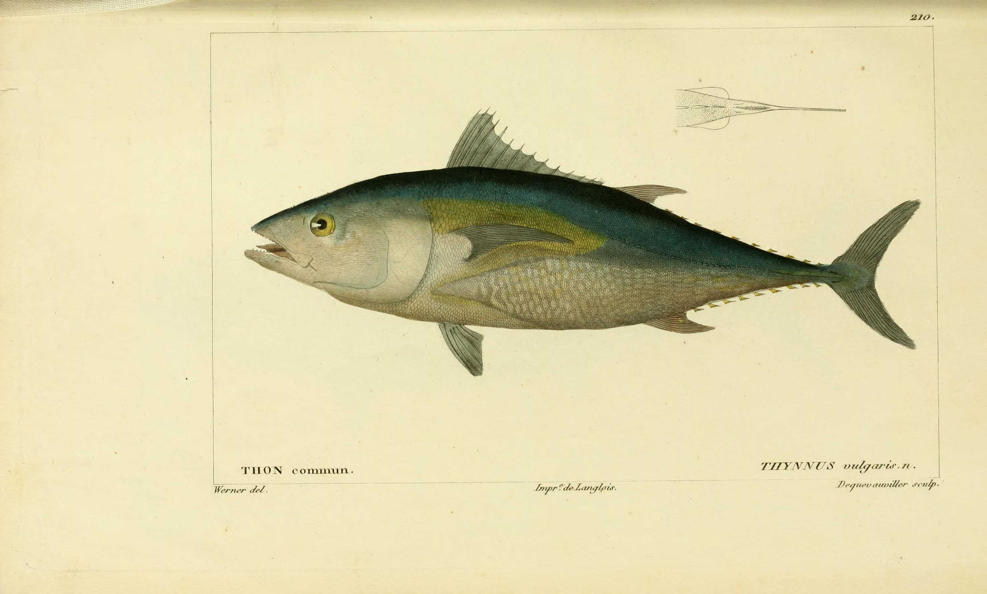 Thunnus thynnus syn. Thynnus vulgaris